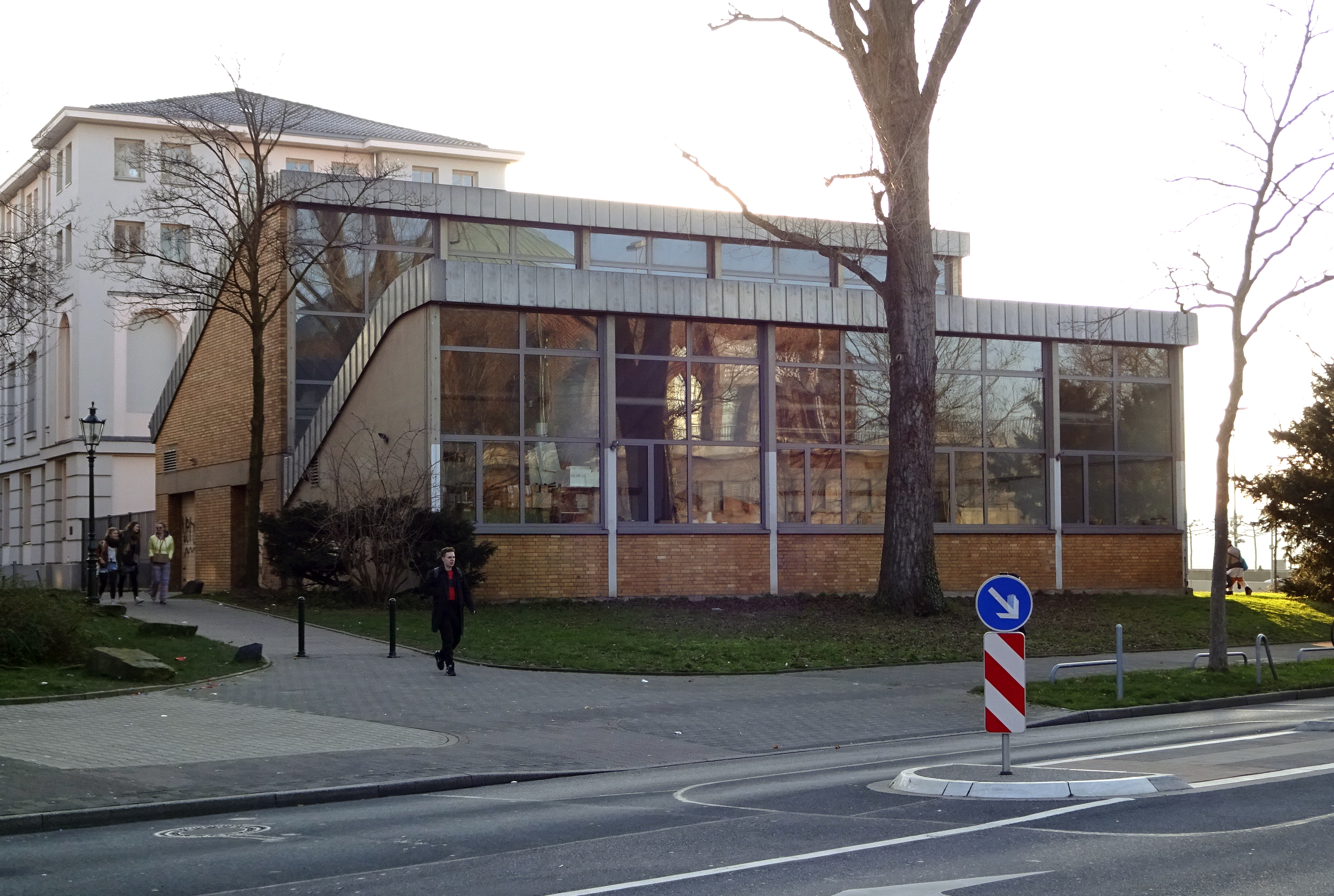 Atelierhaus der Kunstakademie in Düsseldorf-Altstadt, von Nordosten an der Fritz-Roeber-Straße zum Emma-Horion-Weg